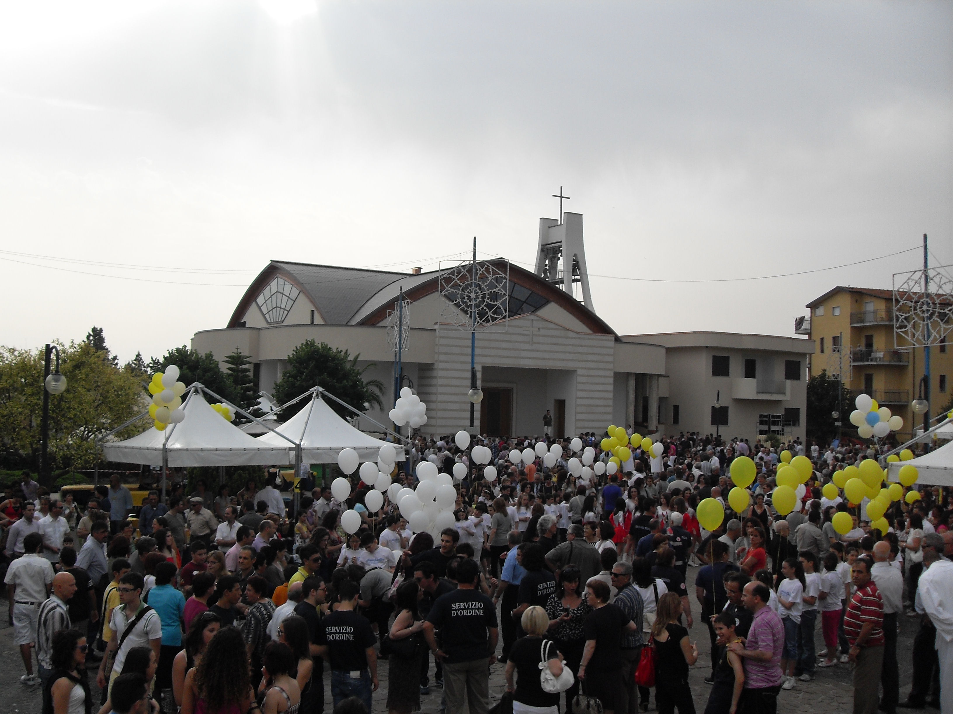 Io Luigi Salvatore "Lodewijk" Vadacchino, rilascio con licenza cc-by-sa l'immagine Campora_San_Giovanni_2010_-_Inaugurazione_Nuova_Chiesa_San_Pietro_Apostolo.jpg, l'immagine raffigura la inaugurazione della Nuova Chiesa di San Pietro Aposolo avvenuta il 12 giugno 2010. vi porgo i Miei più distinti saluti -- 12:19, 16 giu 2010 (CEST)